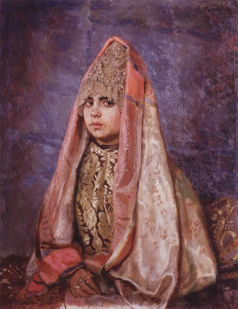 Боярышня (Портрет В.С.Мамонтовой)